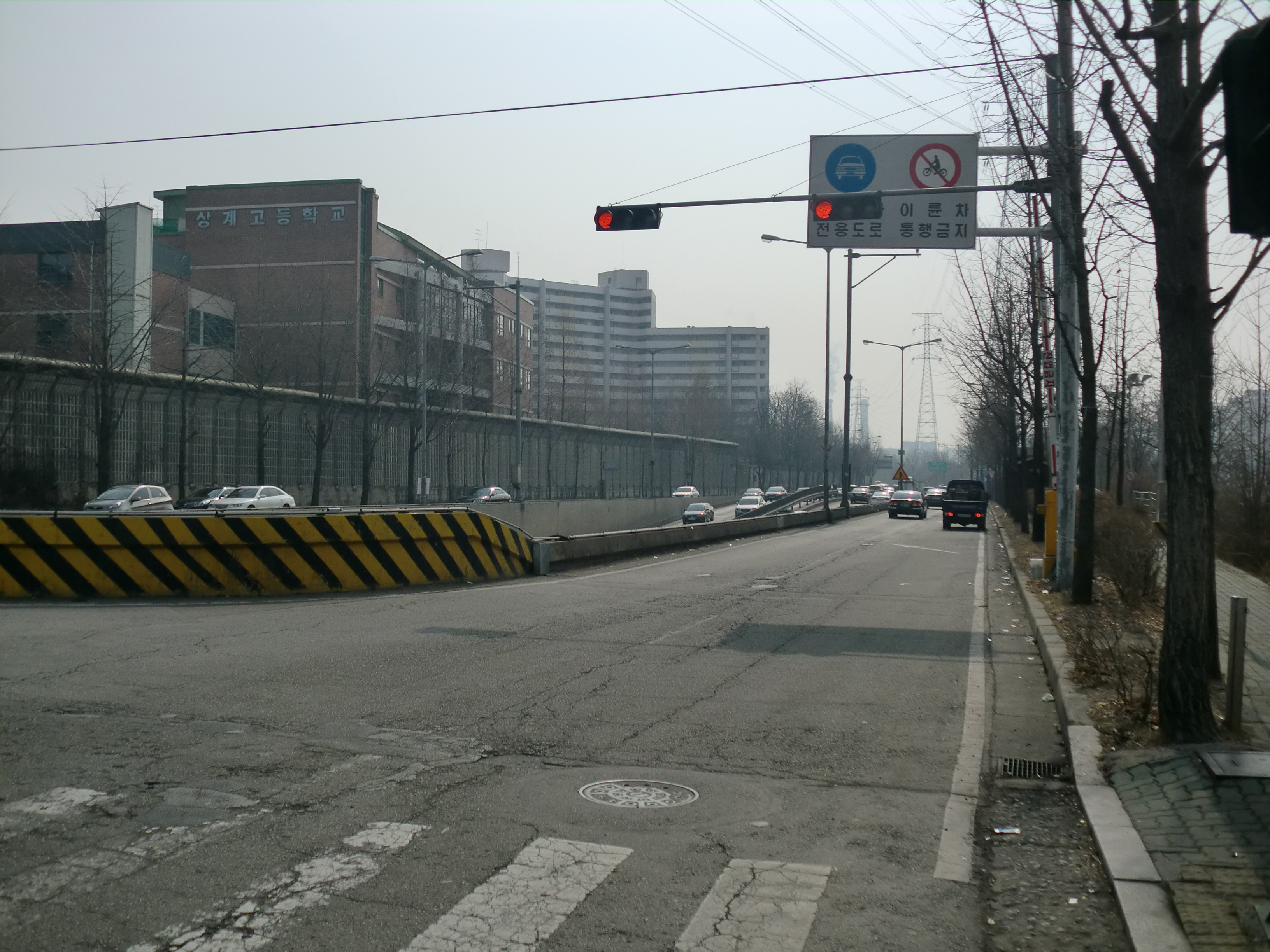 동부간선도로 창동교 출입구